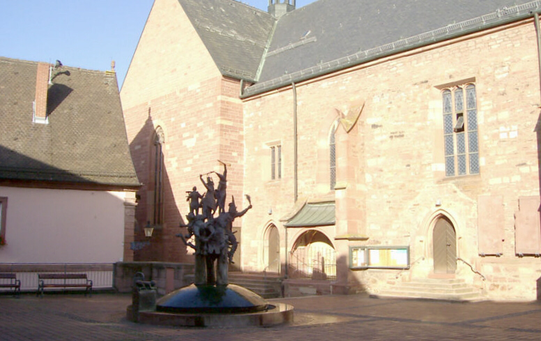 Innenstadt Buchen (Odenwald), oberer Marktplatz